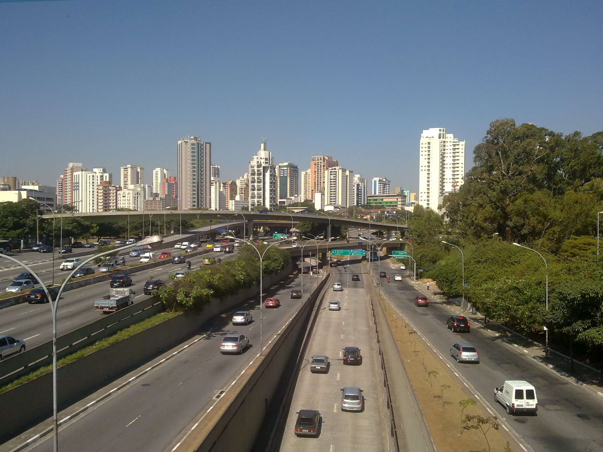 Vista da Avenida Vinte e Três de Maio e ao fundo o bairro de Moema, localizado no distrito homônimo, zona centro-sul da cidade de São Paulo, Brasil.